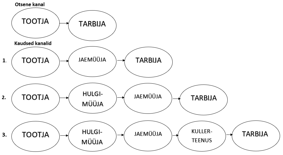 Turustuskanali jagunemine